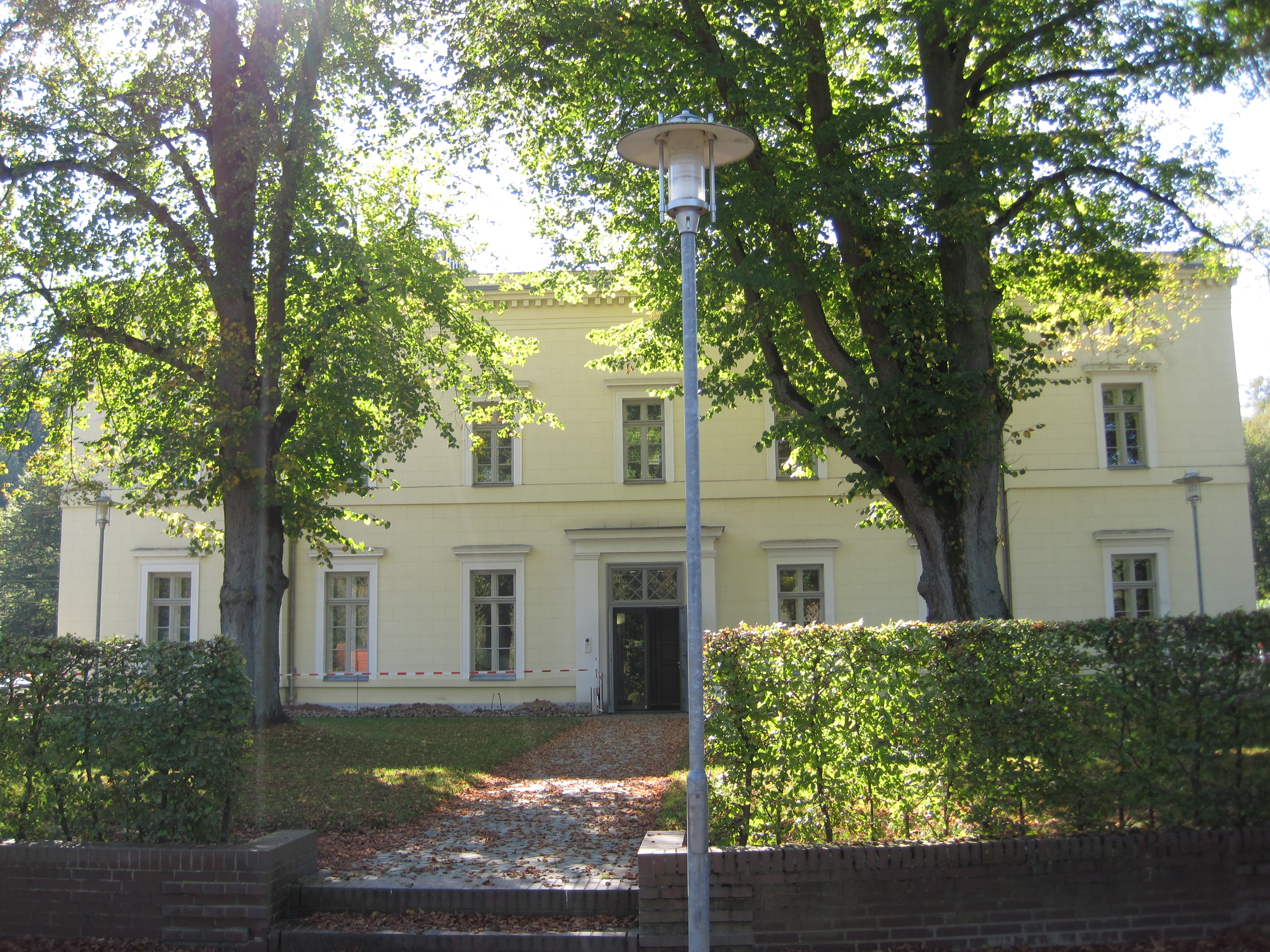 Gebäude der Otto-von-Bismarck-Stiftung im ehemaligen Bahnhof von Friedrichsruh